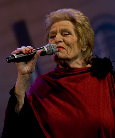 La cantante de fados Celeste Rodrigues